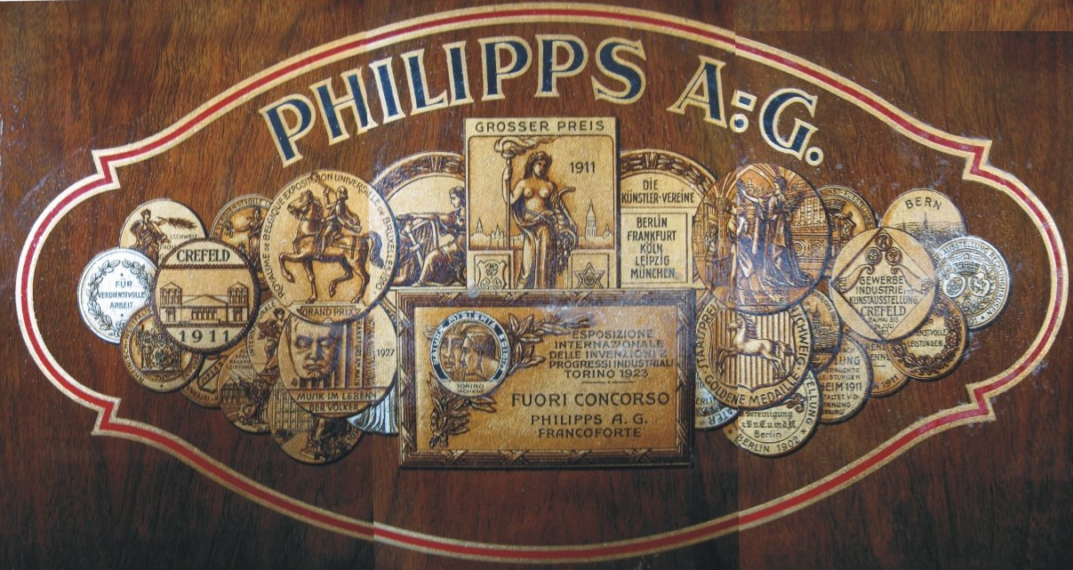 J. D. Philipps, Bild von Firmenwappen. Die Firma Philipps produzierte bis 1929 elektrische Klaviere und Kunstspielapparate in den Werken Frankfurt Bockenheim und Frankfurt Rödelheim, zuletzt unter dem Firmennamen Pianella Musikwerke AG. Gründer war 1877 Daniel Philipps, die Orchestrion-Fabrik Philipps & Ketterer in der damals noch selbständigen Stadt Bockenheim vor den Toren der Stadt Frankfurt am Main gründete. Mit dem 1905 patentierten und von dem Philipps-Angestellten Leopold King entwickelten Revolver-Magazin konnten bis zu 12 Notenrollen eingelegt werden und je nach Wahl wiedergegeben werden. Die Firma lautete inzwischen Frankfurter Musik-Werke Fabrik J.D. Philipps. 1906 wurden die Frankfurter Musikwerke Fabrik Philipps & Söhne "Pianella" von 1906 als Schutzmarke eingetragen.